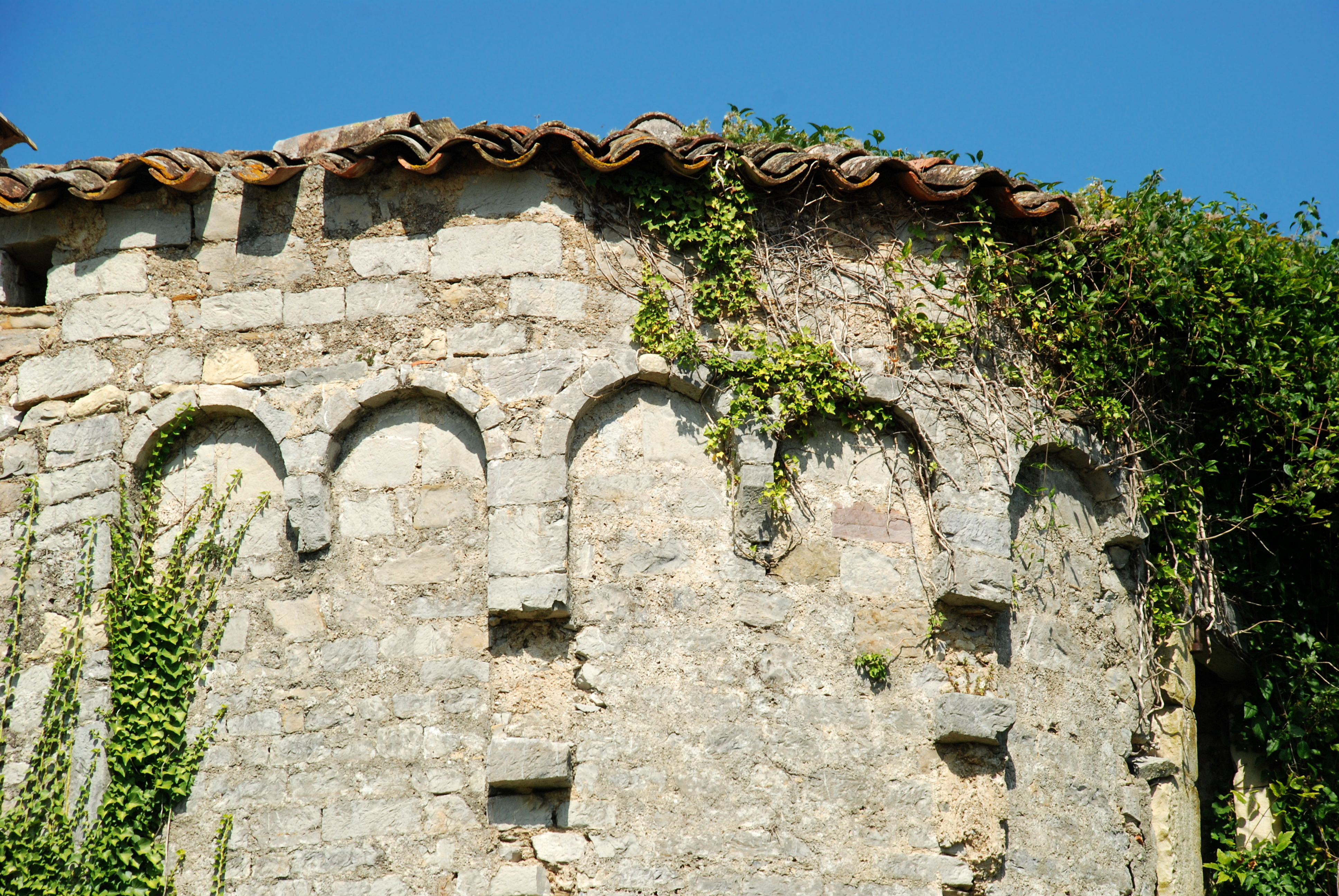 France - Gard - Église de Saint-Martin de Sossenac